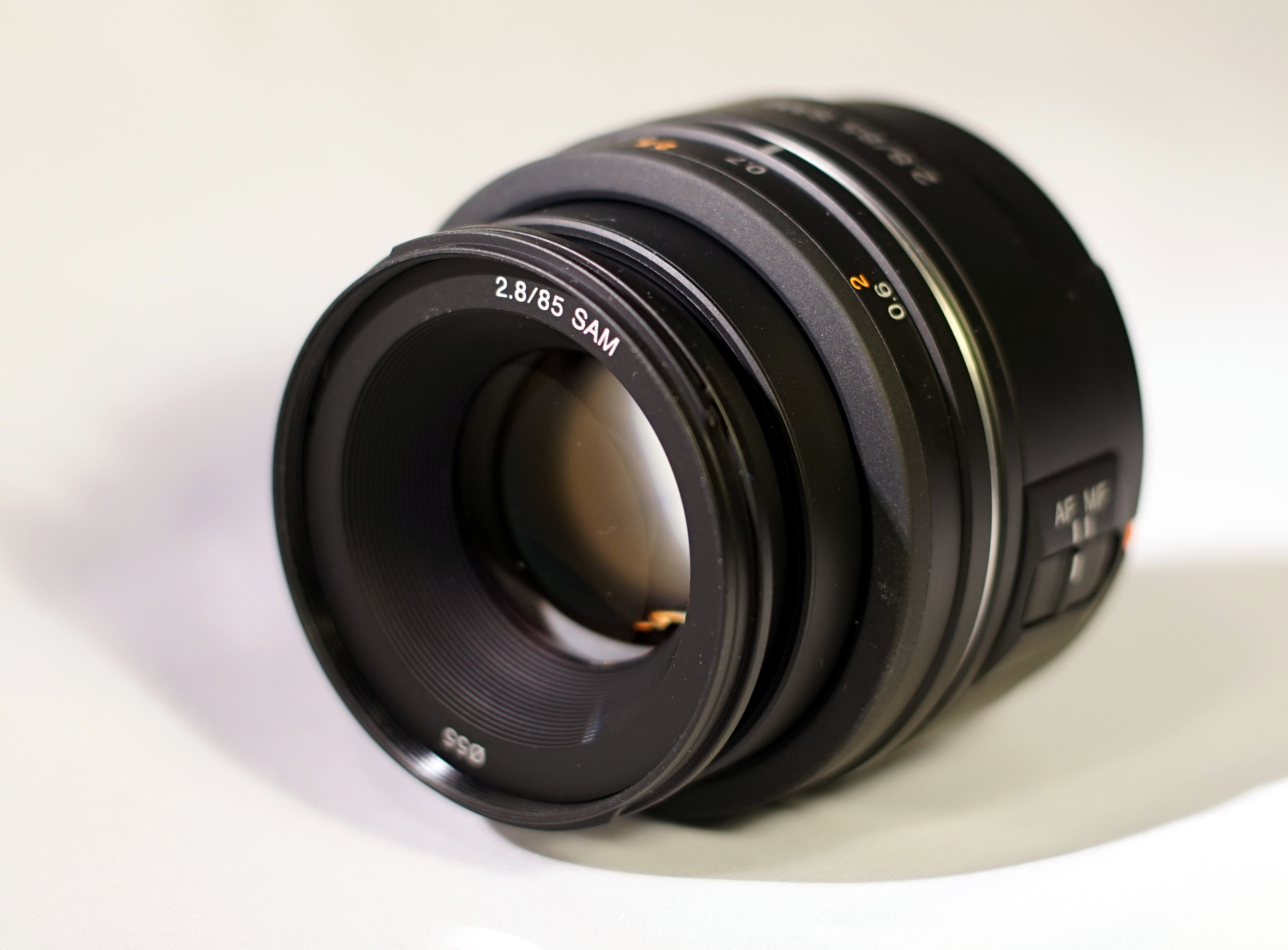 Objektiv / Lens Sony 85 F 2.8 SAM